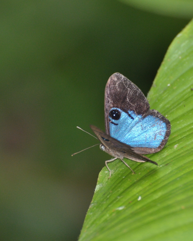 Mesosemia asa, male, Deep-blue Eyemark.